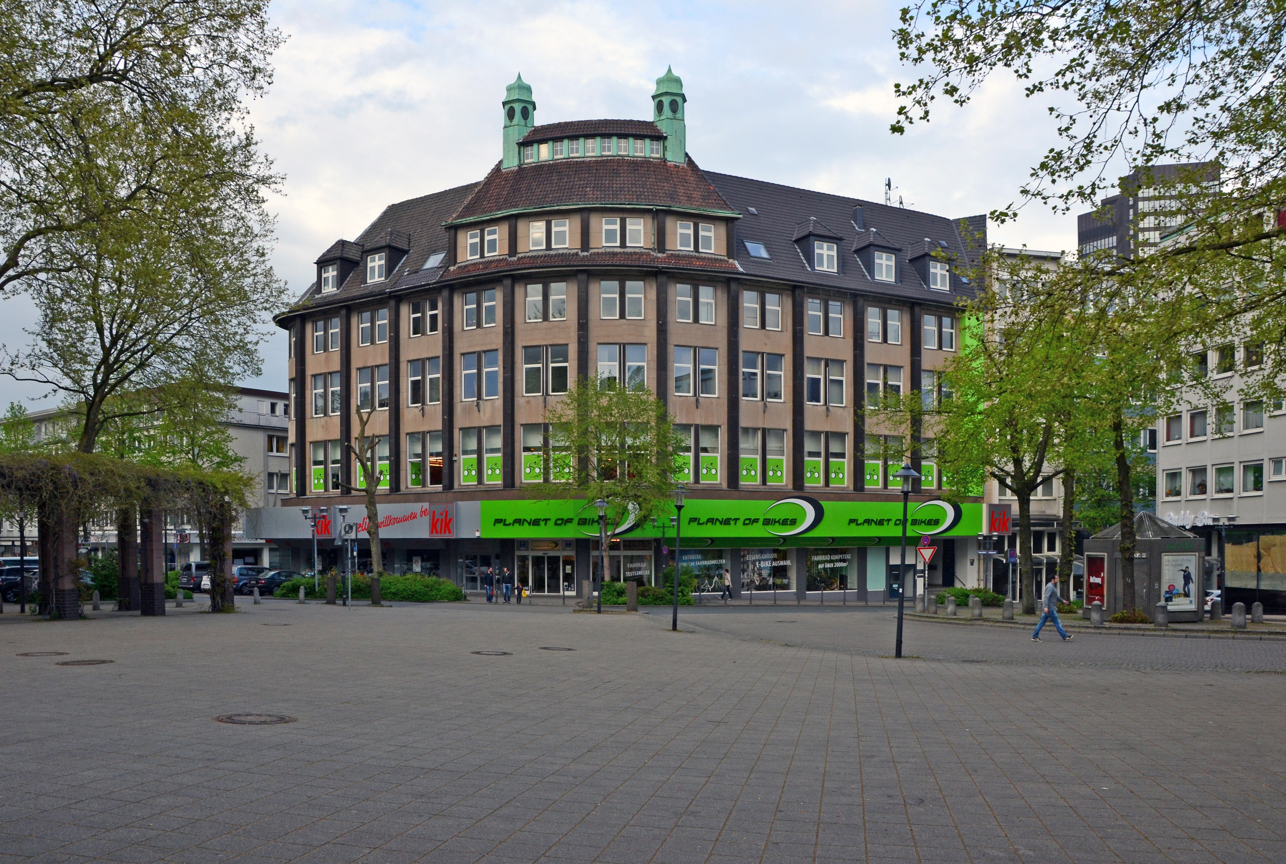 Carl-Overbeck-Haus im Essener Stadtkern; erbaut 1912 durch Ernst Knoblauch, nach dem Krieg verändert